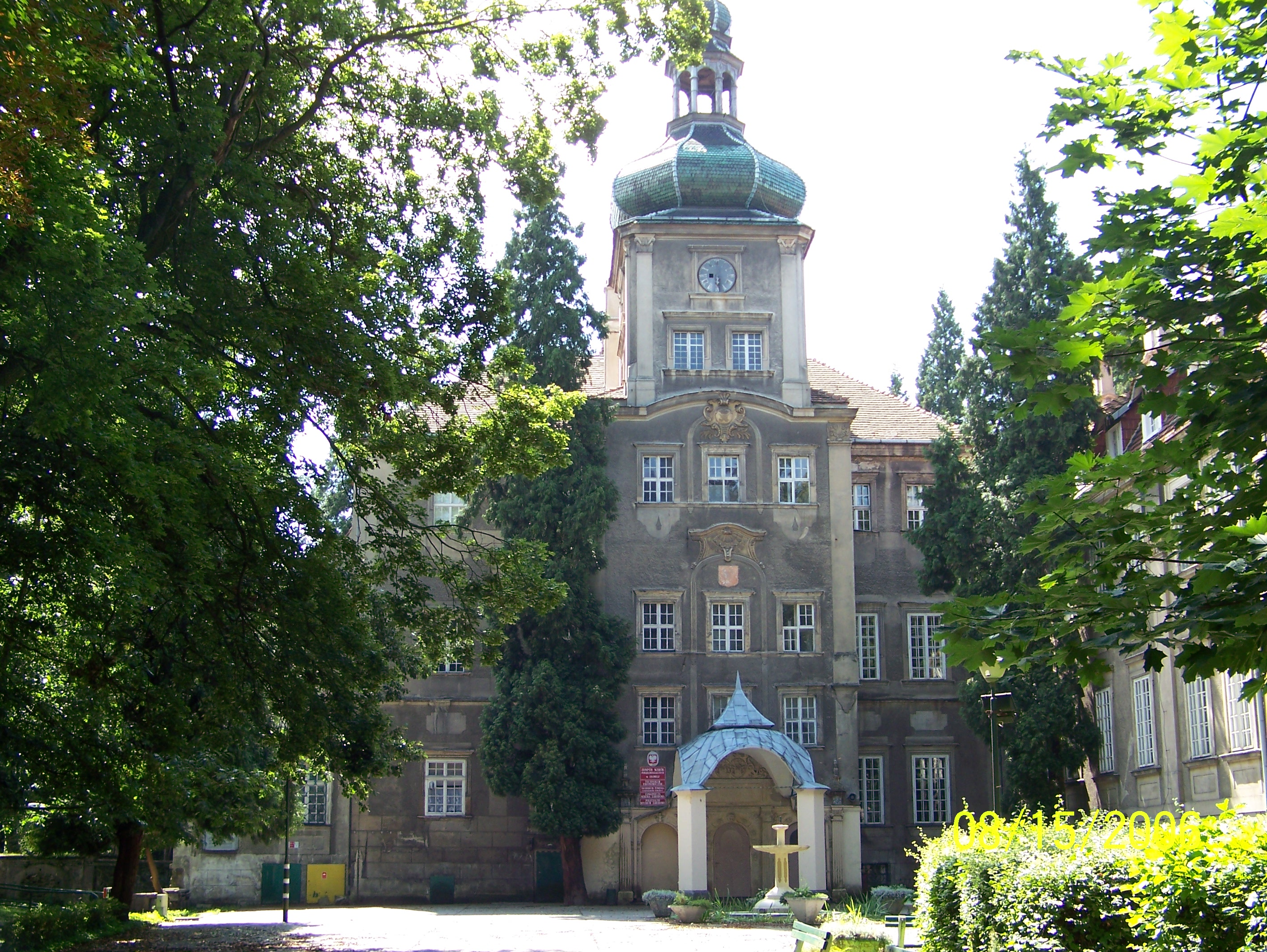 Renesansowy pałac w Iłowej, widok z przodu